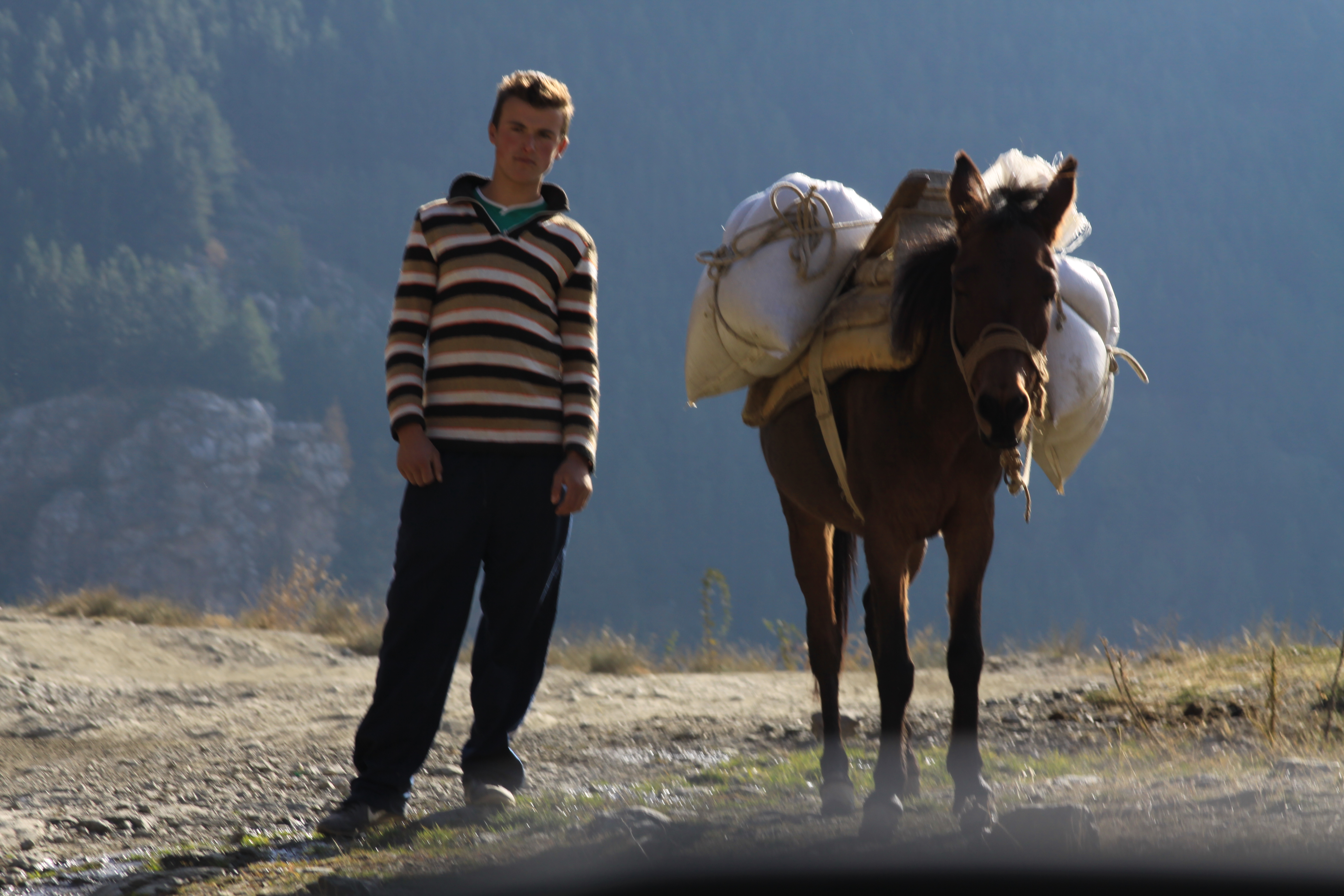 Foto e Kalit qe perdoret per tansport ne fshat